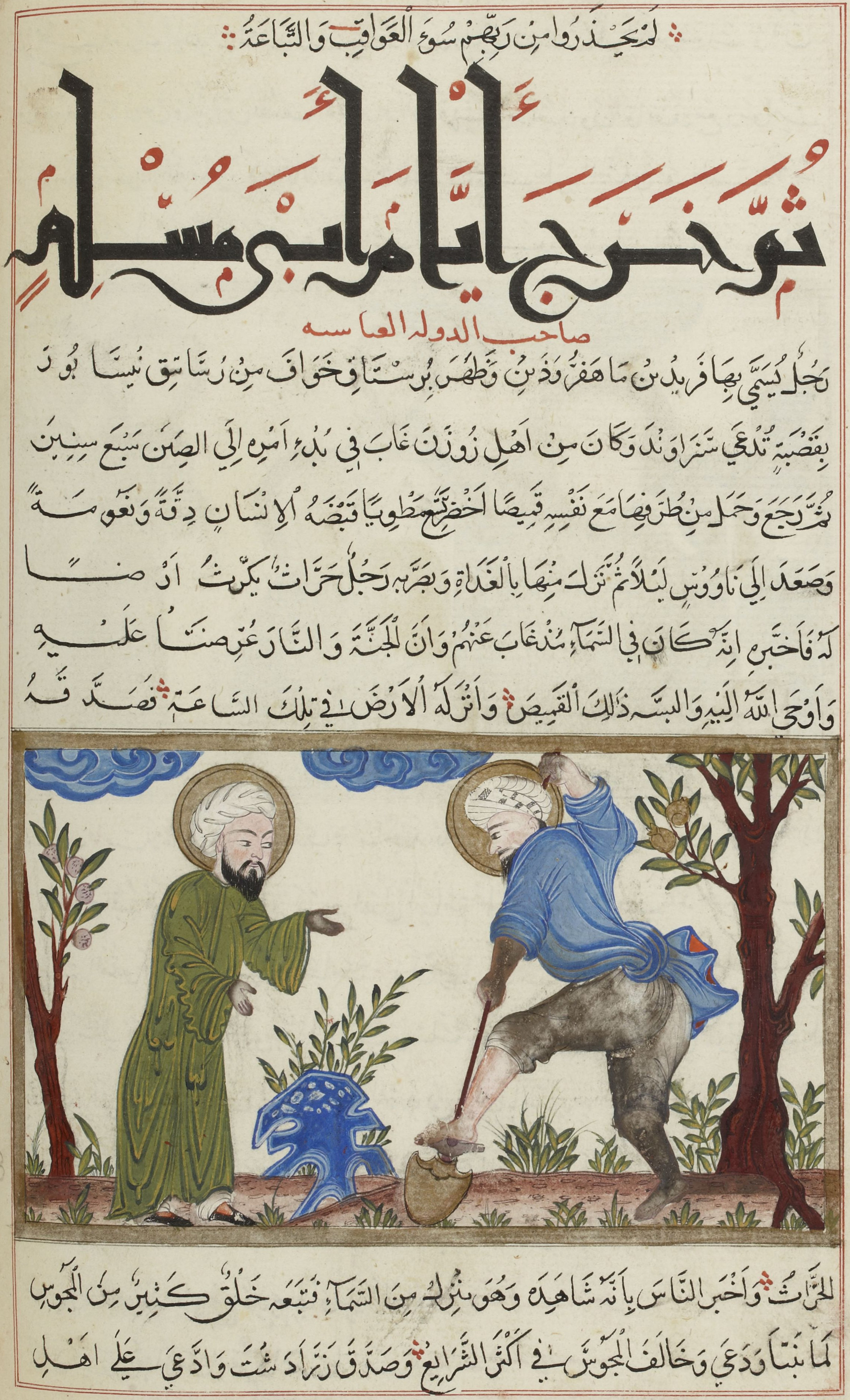 MUḤAMMAD IBN AḤMAD AL-BĪRŪNĪ, m. après 442 h/1050. Al-Āṯār al-bāqiya ʿan al-qurūn al-ẖāliya.